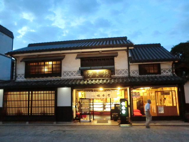 岡山県倉敷市にある和菓子屋さんの橘香堂（美観地区店）です。